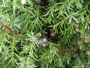 Juniperus communis